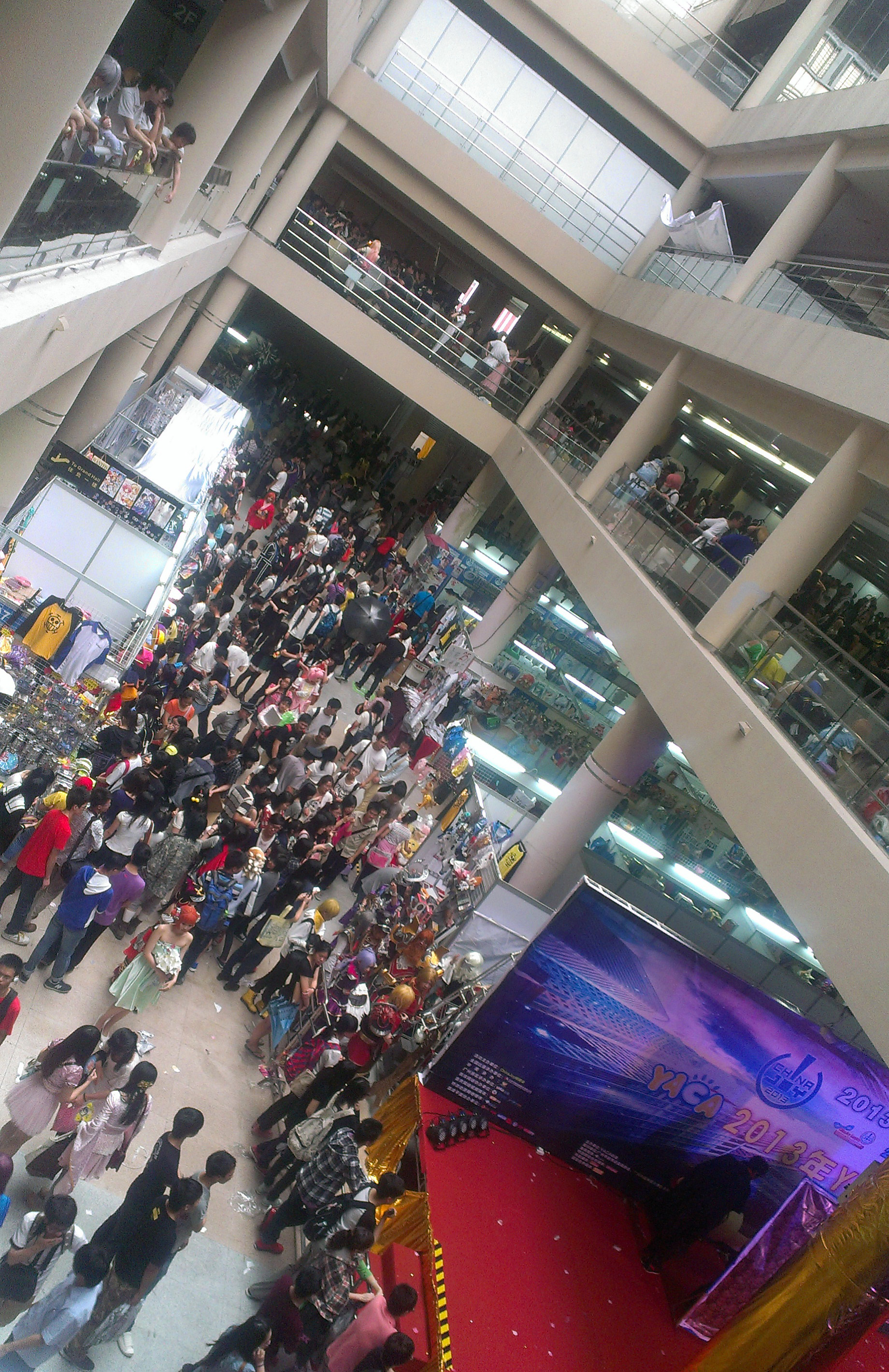 2013年YACA五一動漫盛裝嘉年華於中洲國際展覽中心舉行。